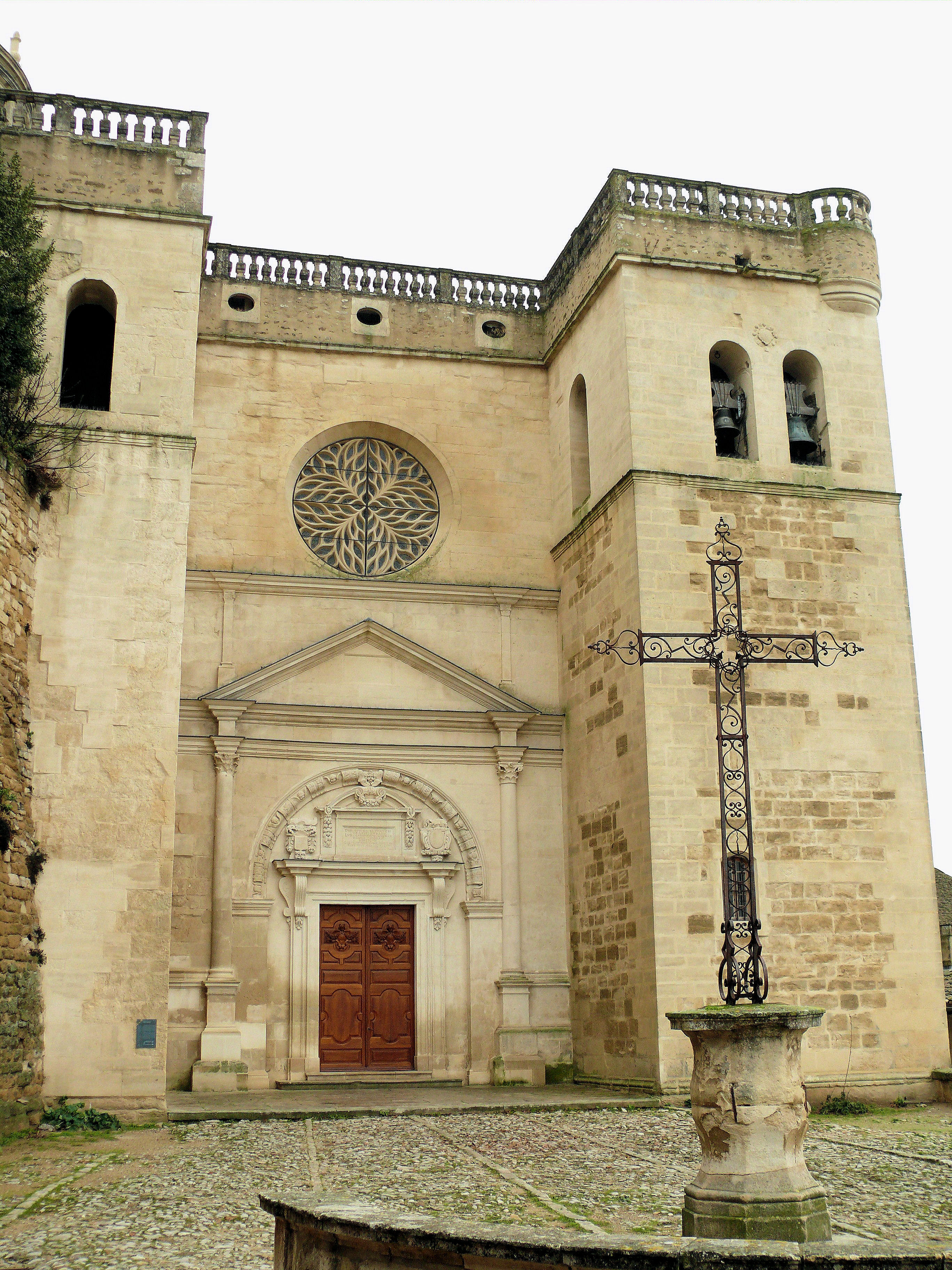 Grignan - Collégiale Saint-Sauveur - Façade